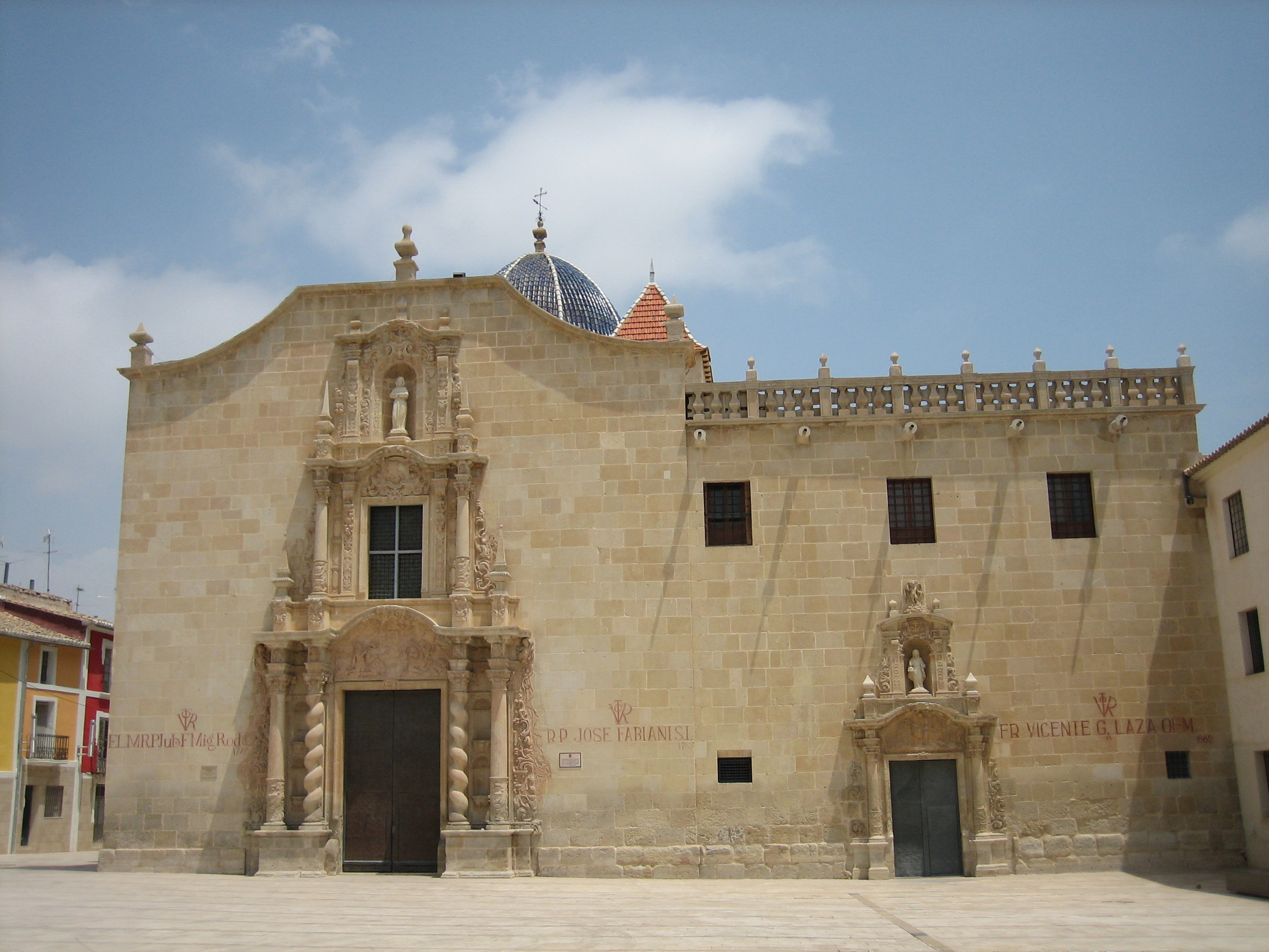 Fachada principal del monasterio de la Santa Faz (Alicante, España)